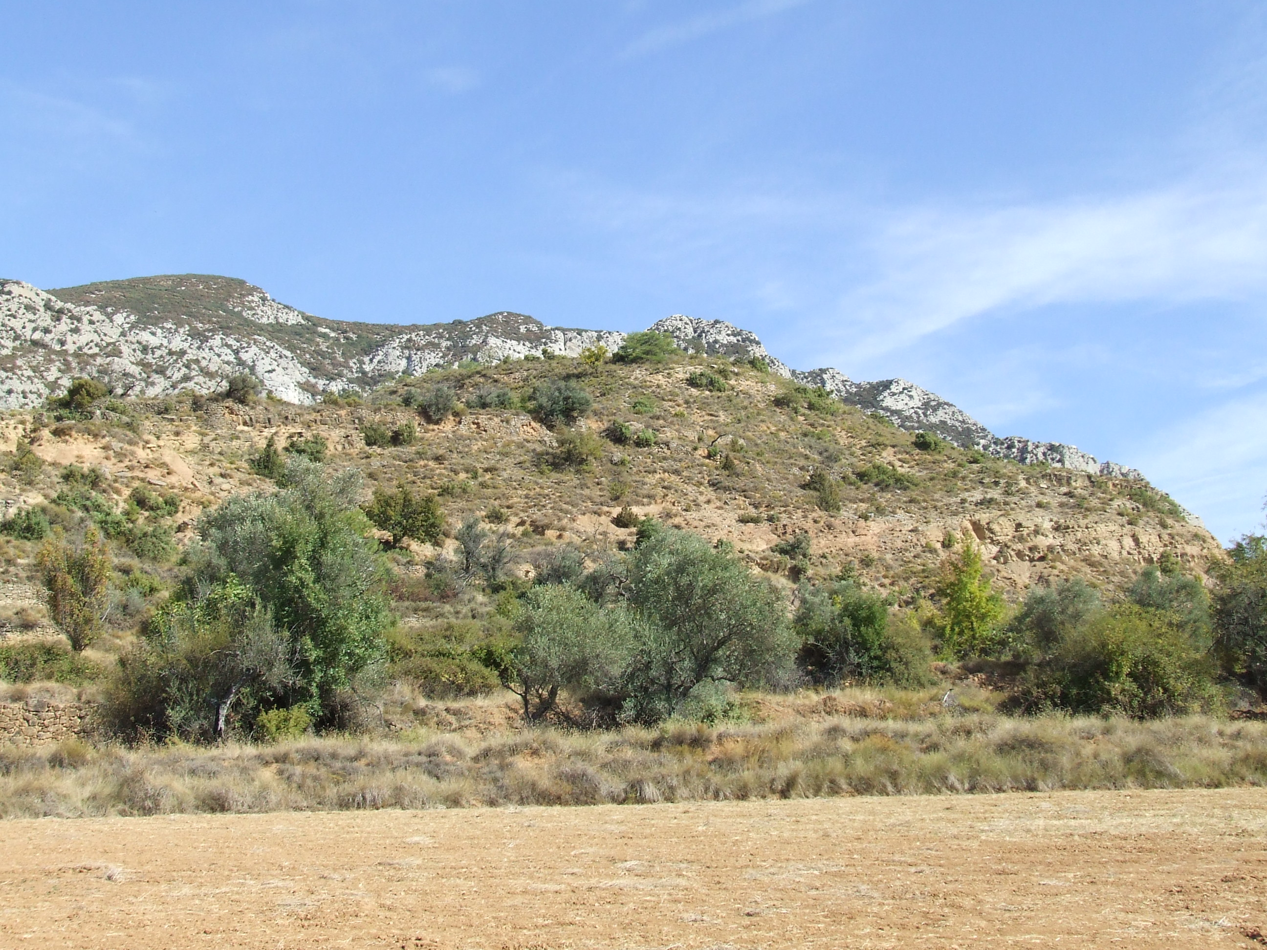 El Tossal del Montsor (Abella de la Conca, Pallars Jussà)